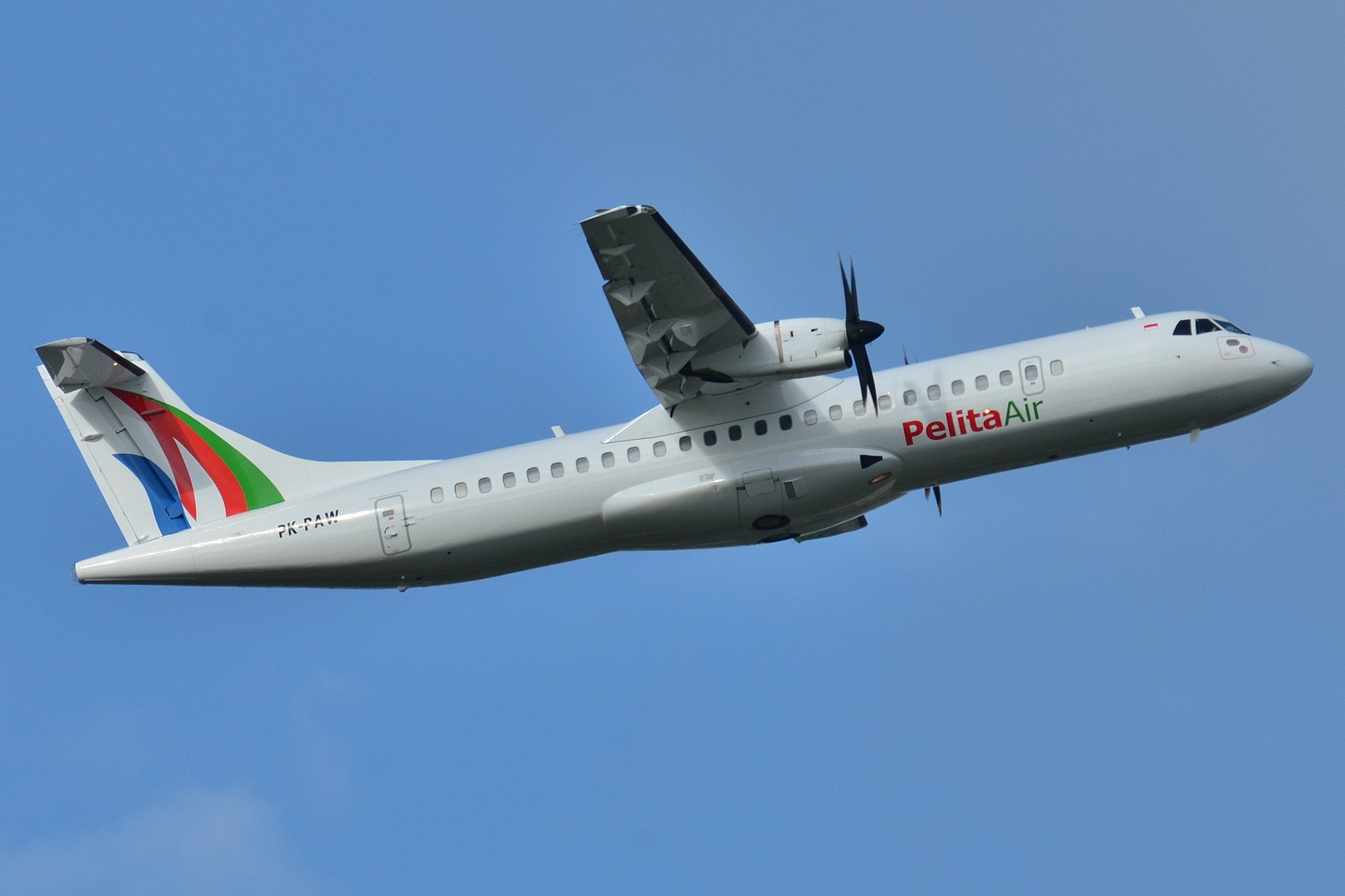 Photo prise à l'aéroport de Toulouse-Blagnac (LFBO) en France. Picture take at Toulouse-Blagnac Airport (LFBO) in France.